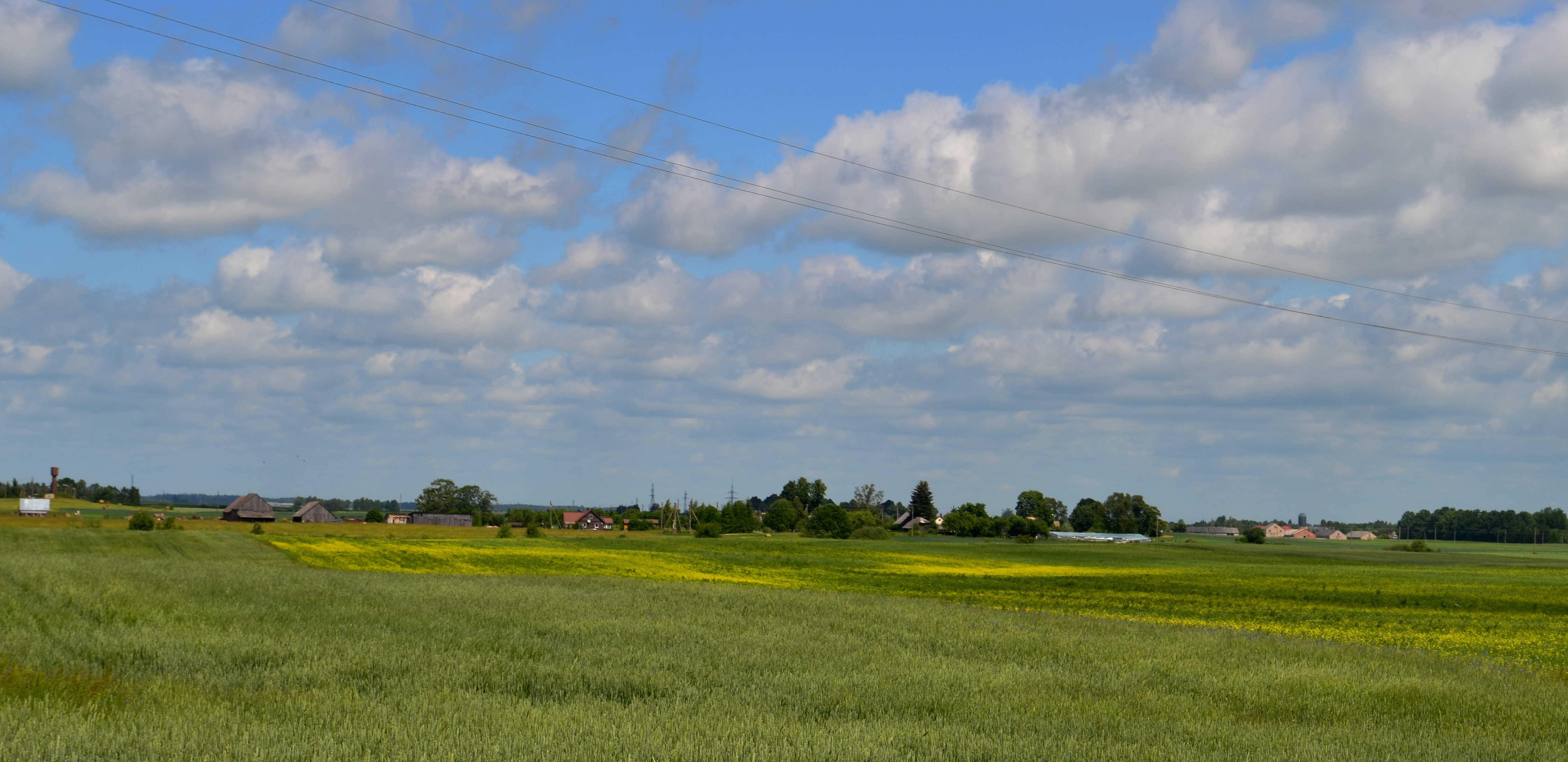 Norkūnai, Kėdainių raj.